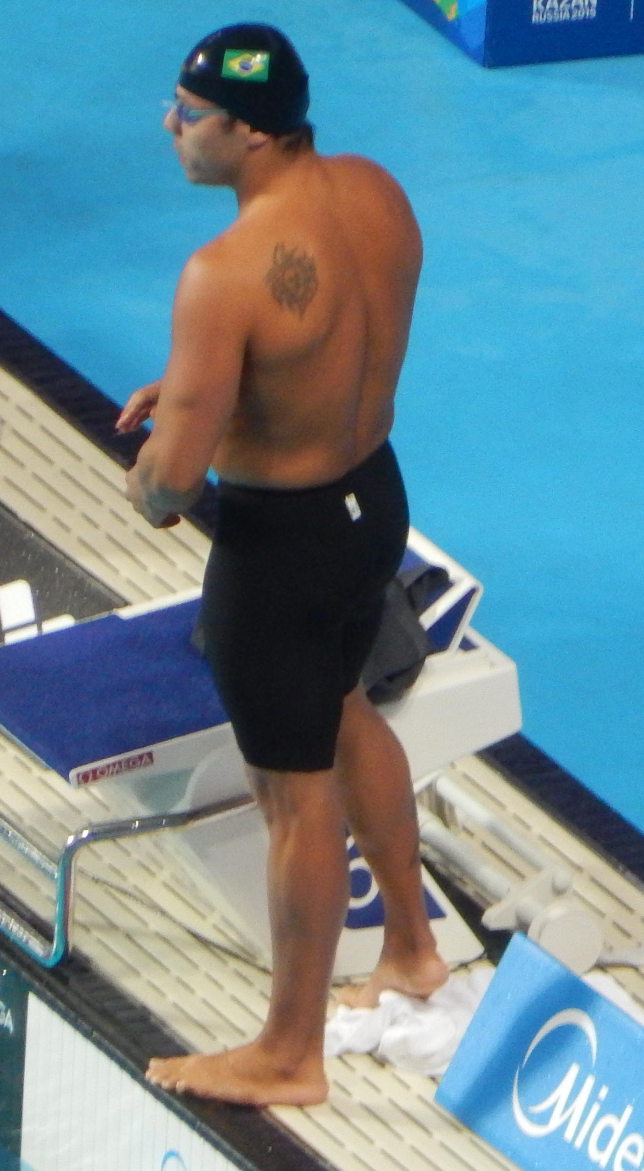 Филипе Силва в финале 50 метровки брассом в Казани